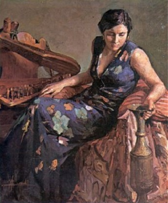 "Donna con abito a fiori", olio su tela, cm. 124 x 94, coll. privata